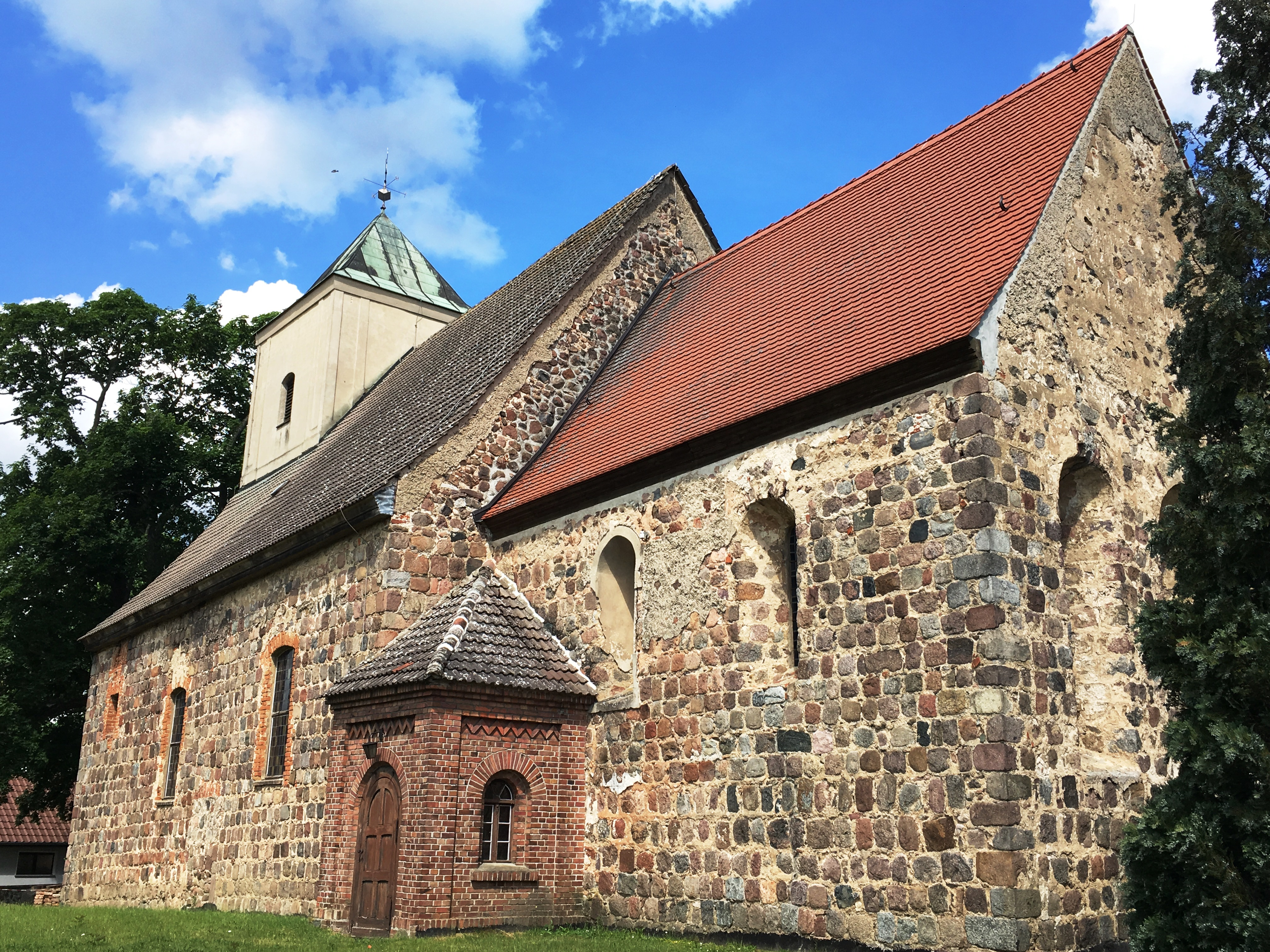 Die Dorfkirche Beerfelde ist eine Feldsteinkirche aus der zweiten Hälfte des 13. Jahrhunderts. Im Innern stehen unter anderem die Reste eines Altarretabels aus dem Jahr 1713, ein Kanzelkorb aus dem Jahr 1675 sowie eine Sauer-Orgel.